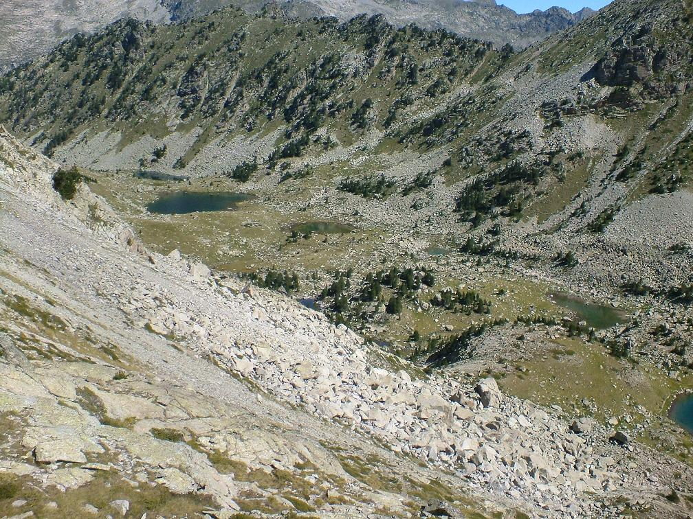 Estanyets de Dellui, vistos des de la Collada; la Vall de Boí, Alta Ribagorça, Catalunya